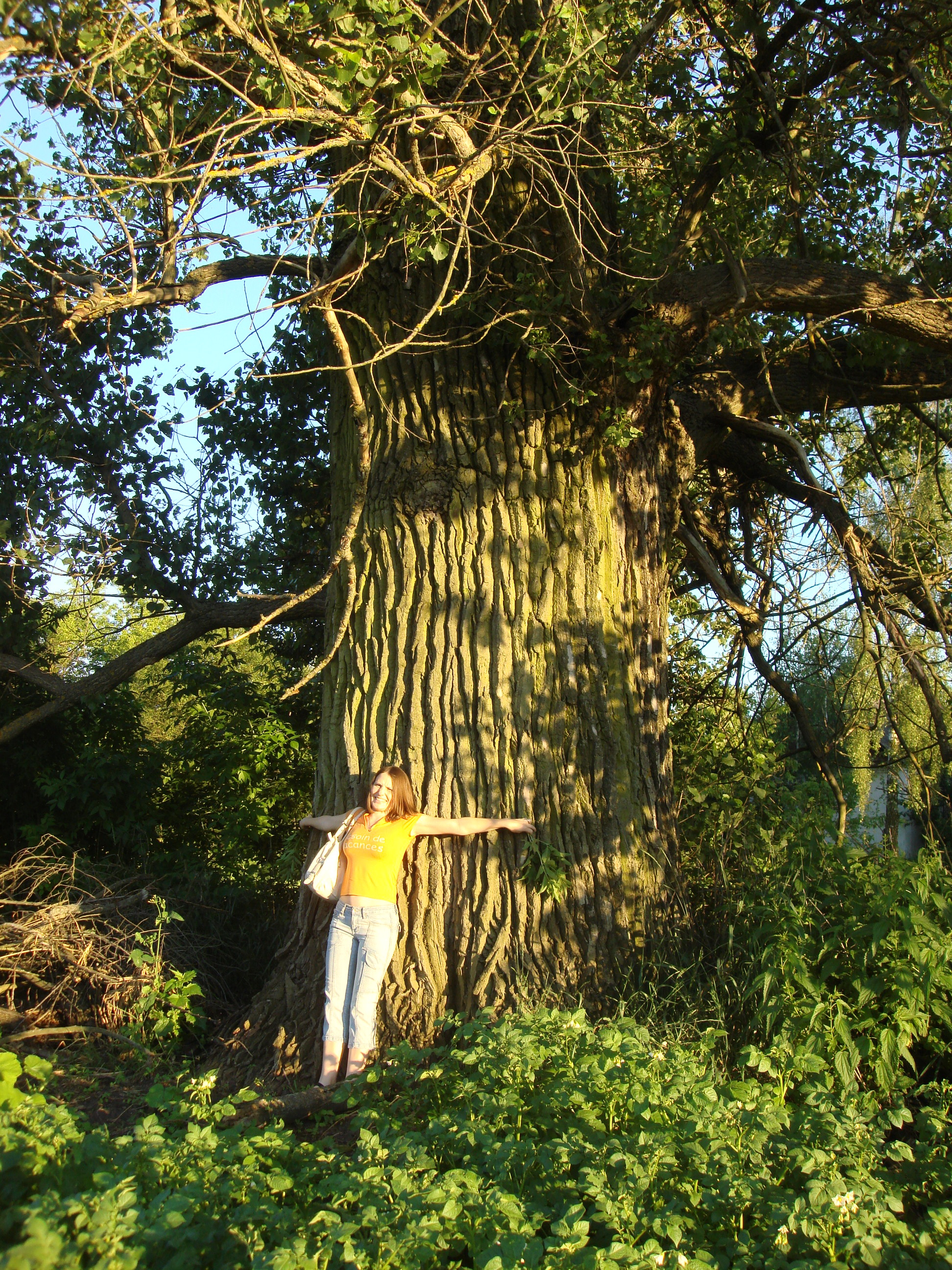 Ось який він, осокір в с.Сингаї Коростенського району